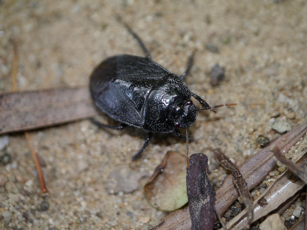 2016/08/16 和歌山県田辺市：Tanabe City. Wakayama Pref. Japan